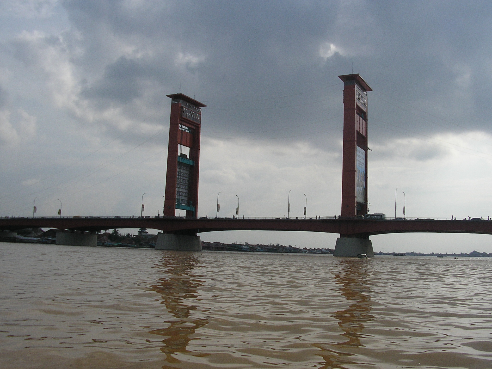 Ampera Bridge, Palembang - South Sumatra (Indonesia)PC250438